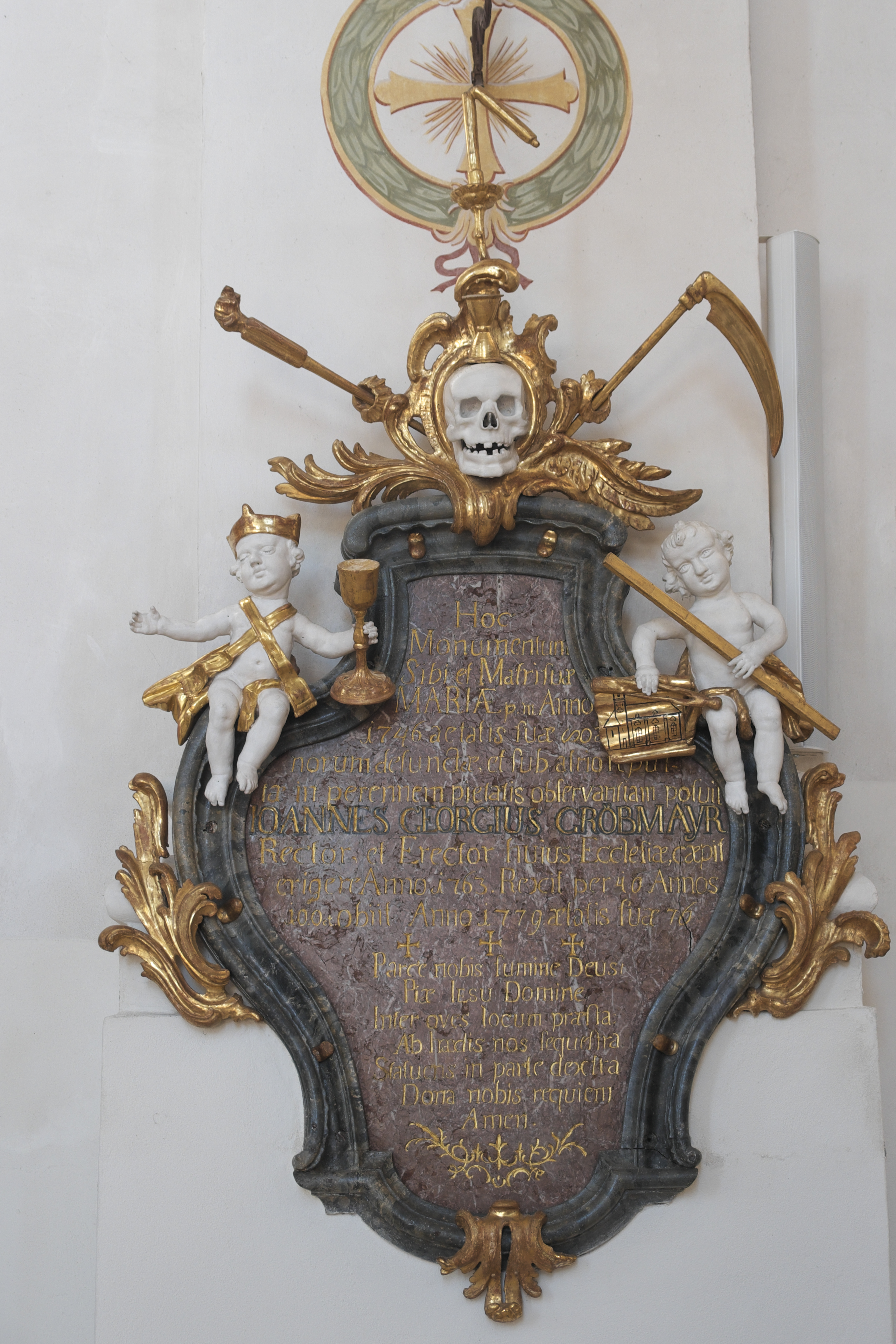 Katholische Pfarrkirche St. Jakobus in Vierkirchen im Landkreis Dachau (Bayern/Deutschland), Epitaph für Johannes Gregorius Gröbmayr († 1779)